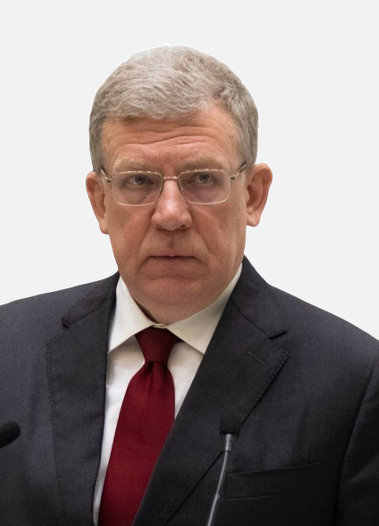 Алексей Леонидович Кудрин (род.1960) — российский государственный деятель.